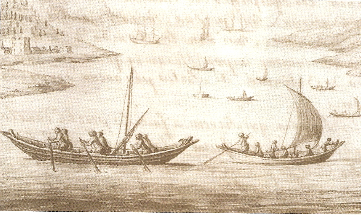 Description de la Pinasse du Bassin d'Arcachon par Le Masson du Parc en 1727